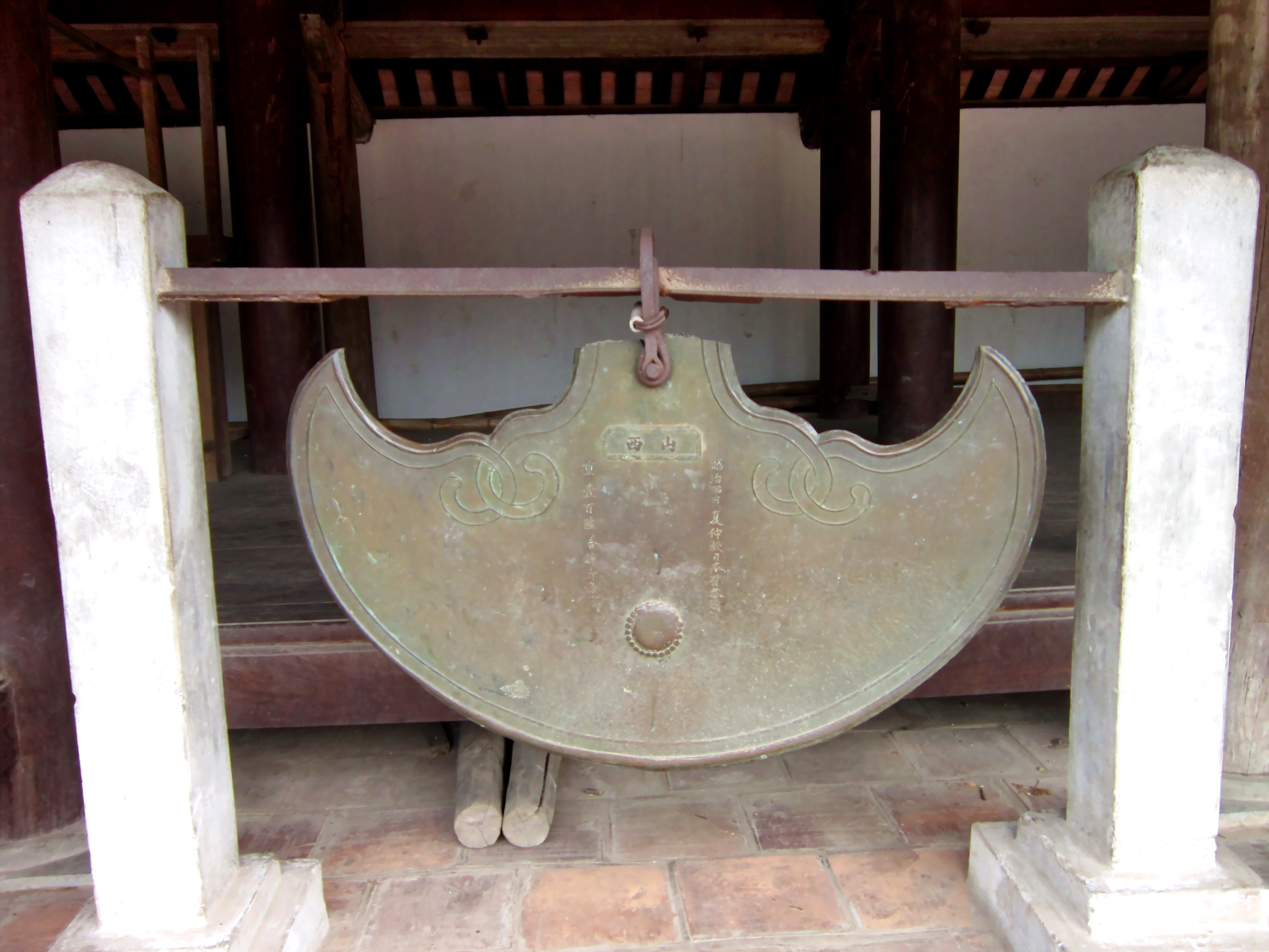 Khánh đồng cổ trong đình Mông Phụ ở làng cổ Đường Lâm, thuộc thị xã Sơn Tây, Hà Nội, Việt Nam.